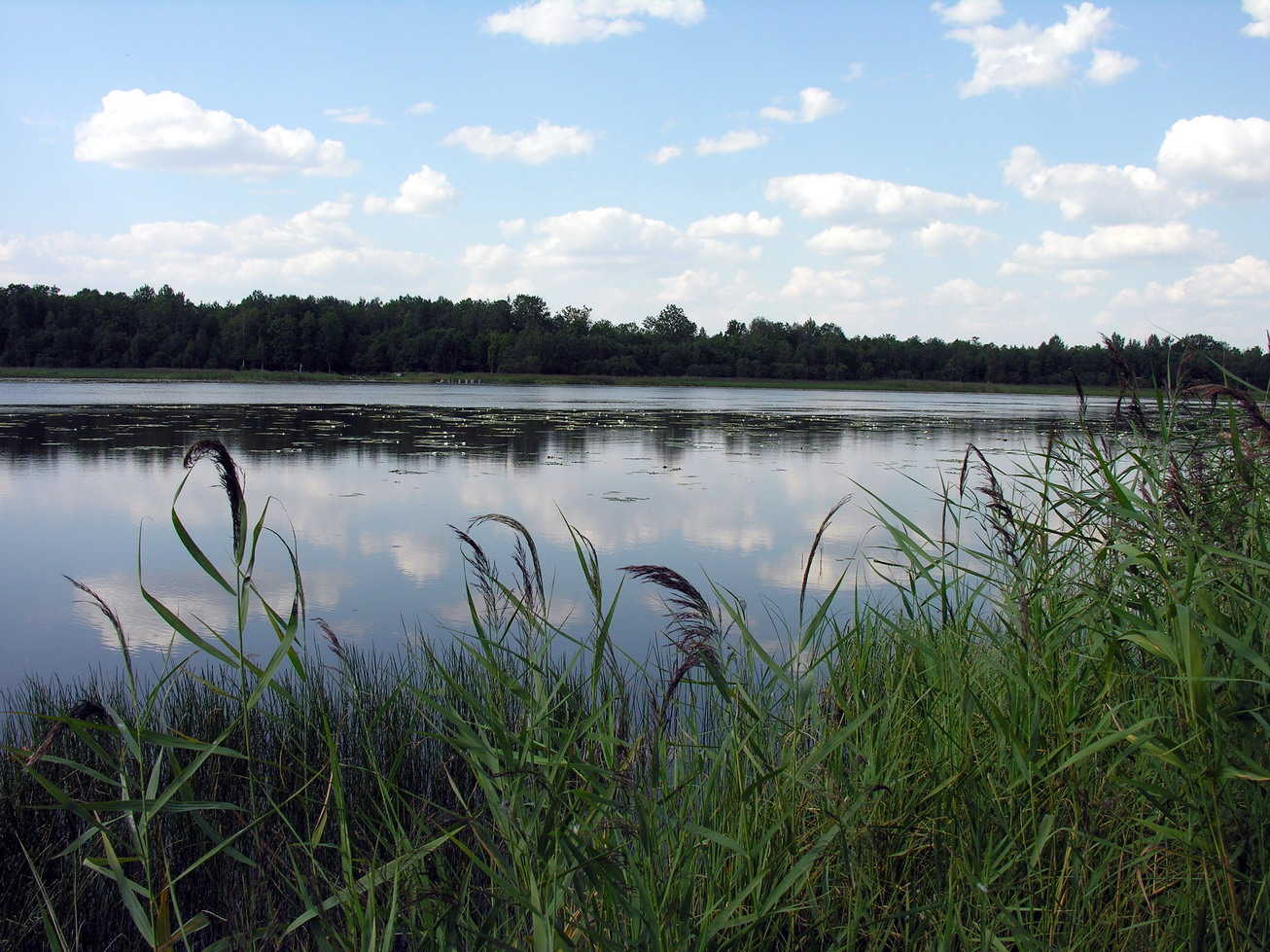 Meižiai, Mažeikių raj., Viekšnių seniūnija Meižių ežeras Foto: Algirdas, 2006 m. rugpjūčio 11 d., Lietuva